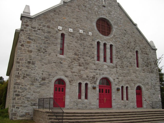 Facade de l'église de St-Jacques-le-Mineur